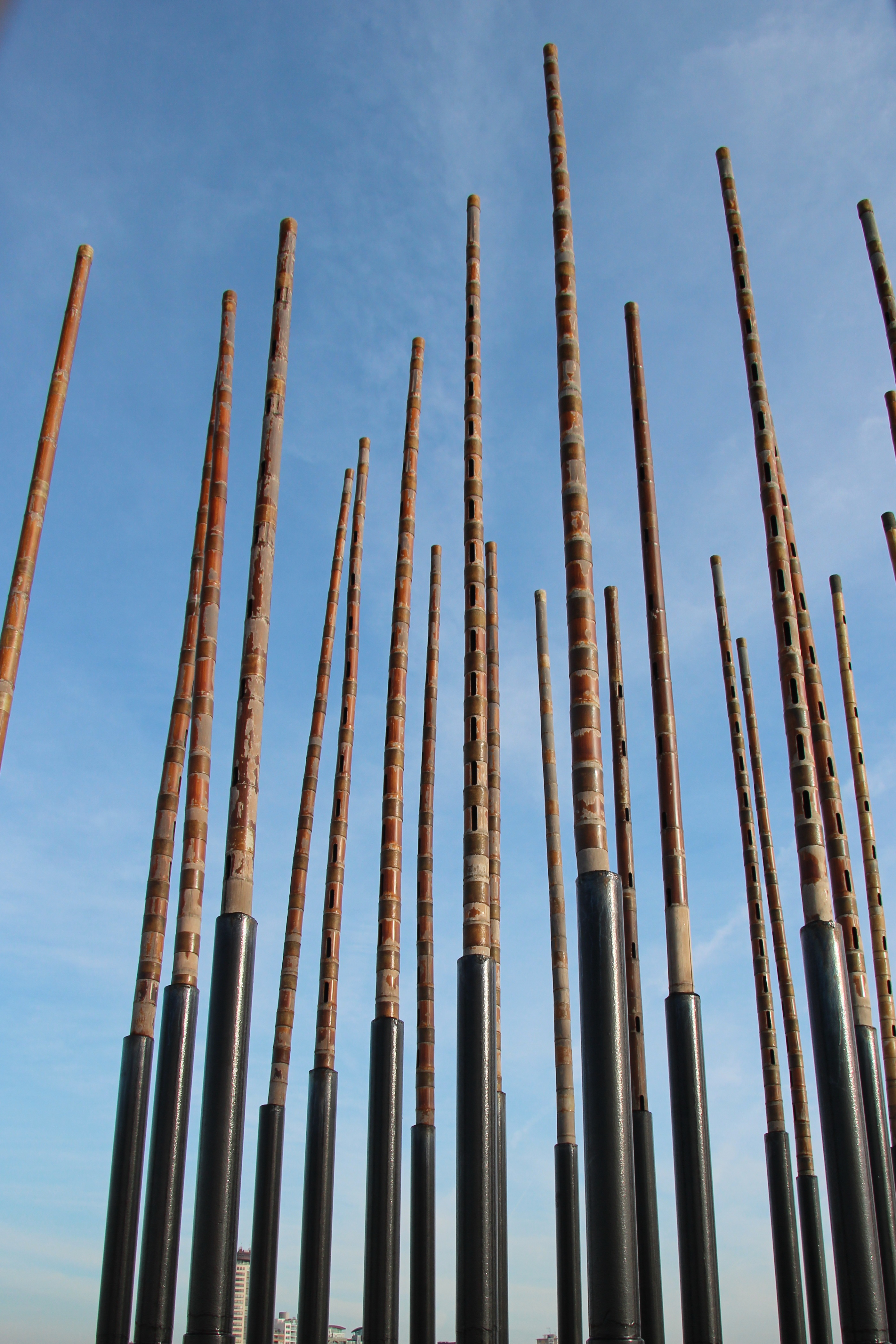 Windorgel - Mass & Individual Moving - 1975